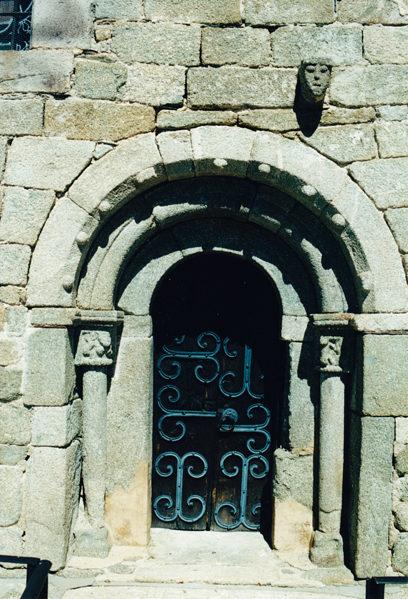 France - Cerdagne - Église Sainte-Colombe de Vià